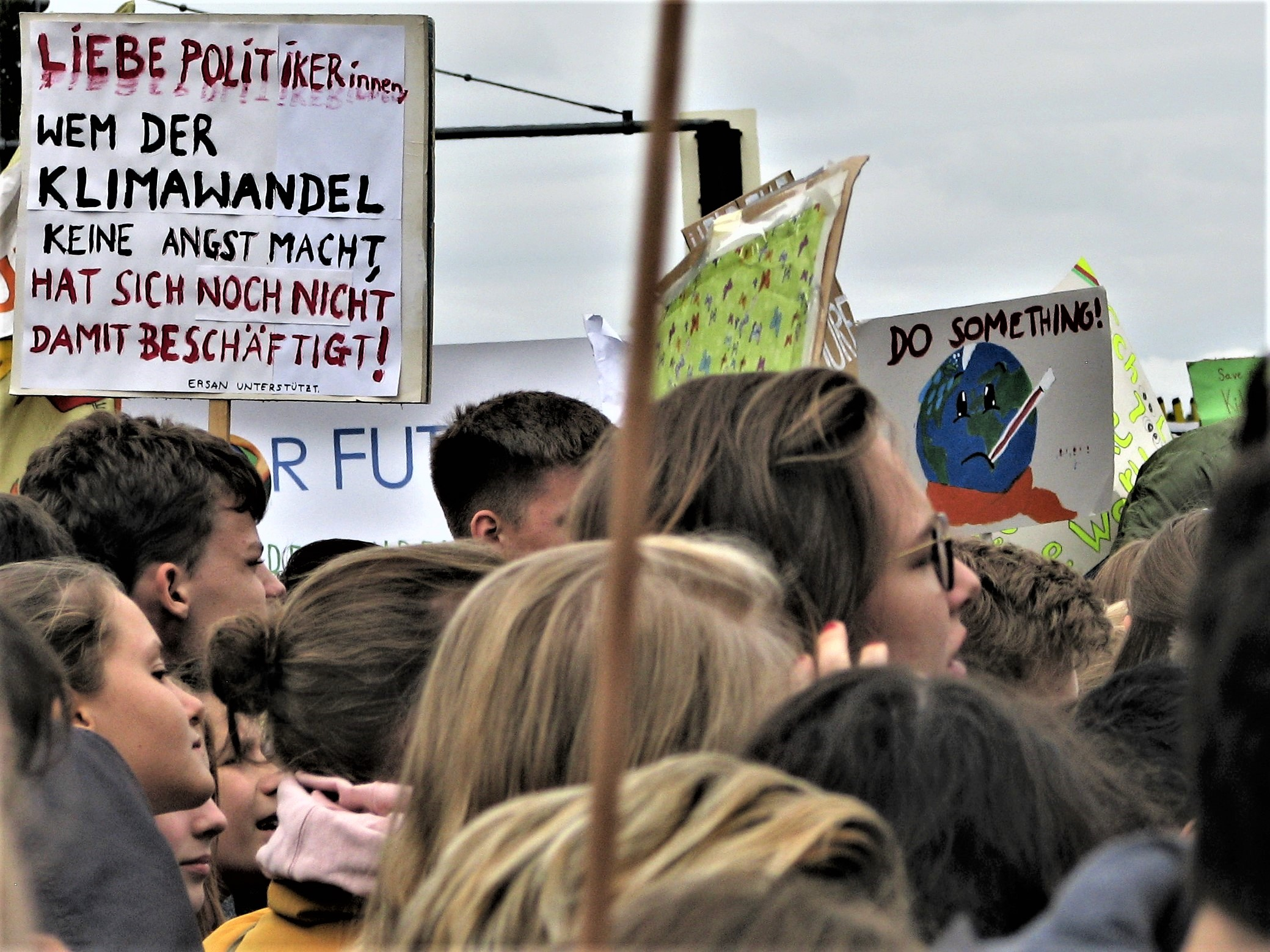 Demonstration am Brandenburger Tor in Berlin, 20. September 2019